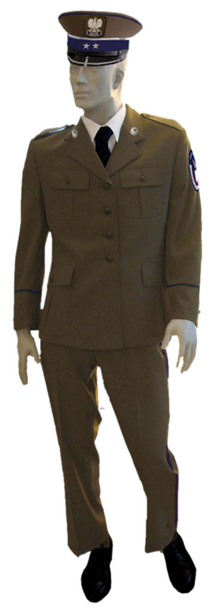 Umundurowanie wyjściowe ABW